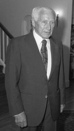 15.9.1986 Der Präsident des Deutschen Bundestages, Dr. Philipp Jenninger, empfängt den Schriftsteller Ernst Jünger in seiner Dienstvilla in Bad Godesberg.